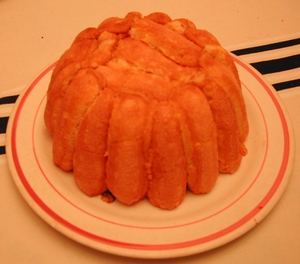 Charlotte (dessert)